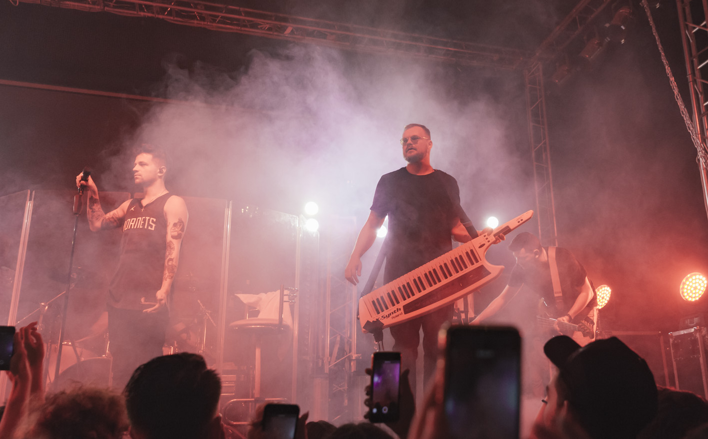 Пётр Клюев и Олег ЛСП на концерте ЛСП